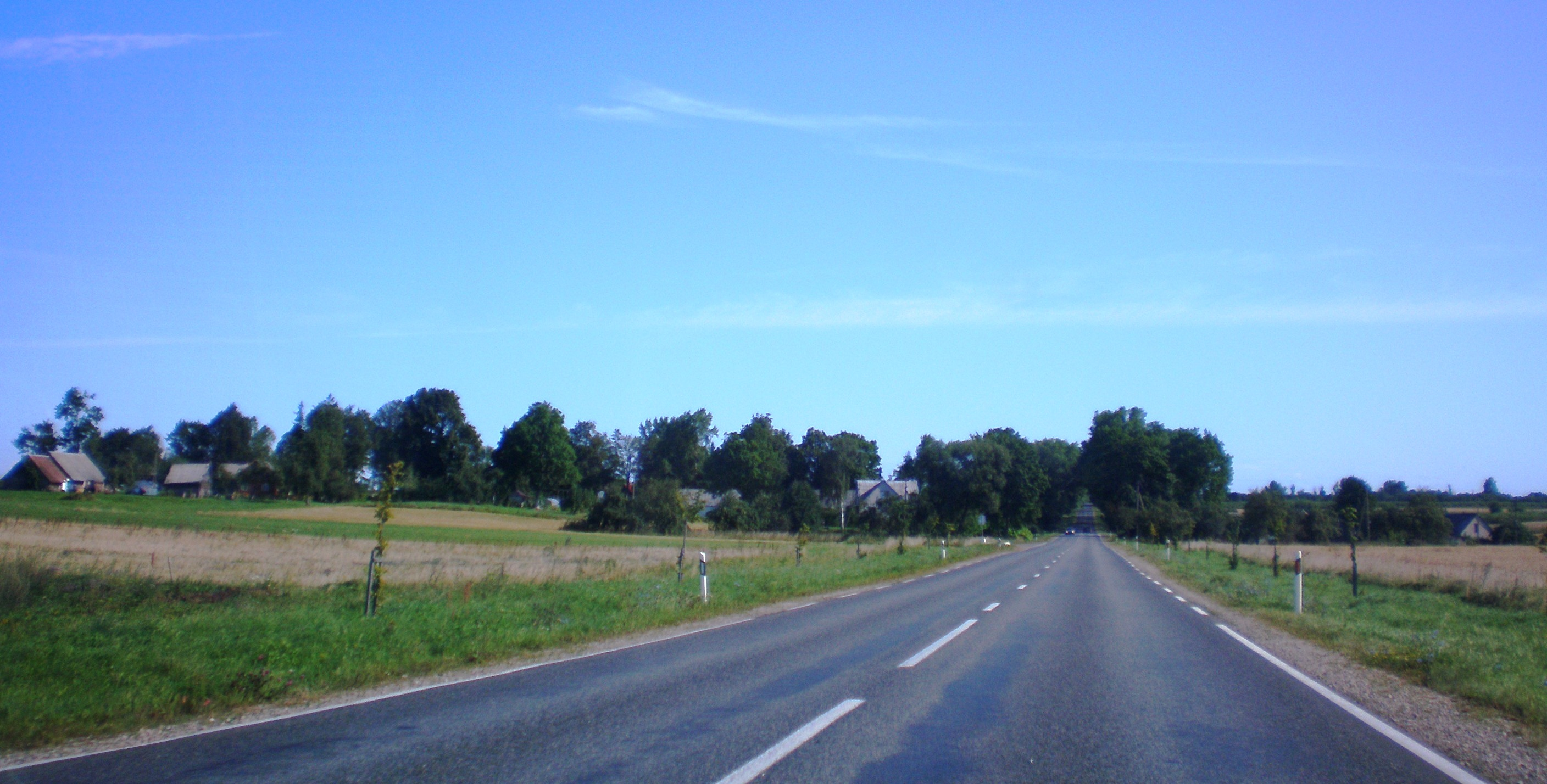 Vaivadiškiai, Anykščių raj., Lietuva